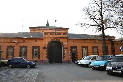 Věznice Plzeň rovněž známá jako Věznice Bory.